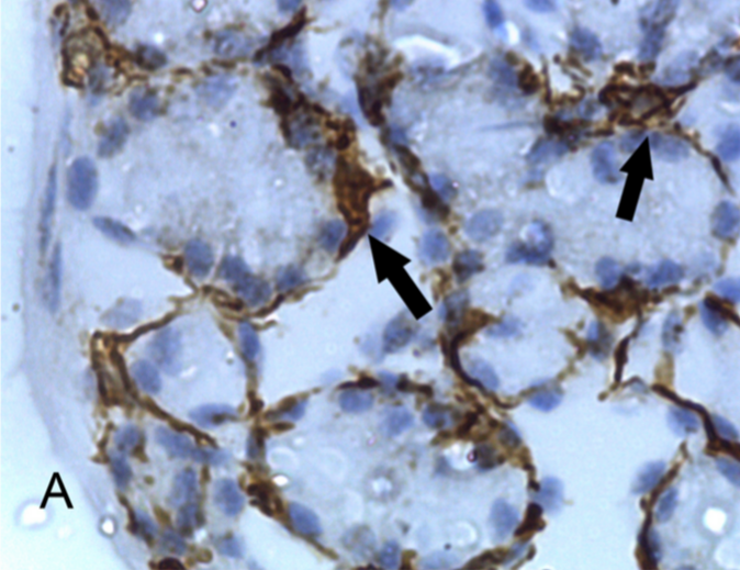 Muestra una reacción de αSMA positiva fuerte, debida al grado de proliferación de las células mioepiteliales (flechas), que rodean los acinos glandulares. Barra de escala= 20μm.